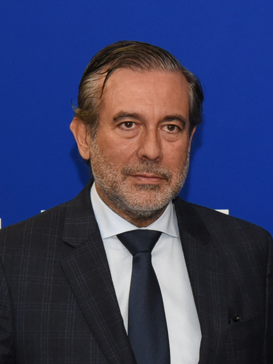 TOLEDO, 23 de octubre de 2019.- El consejero de Desarrollo Sostenible, José Luis Escudero, mantiene, en la Sala de Juntas de la Consejería, una reunión con el consejero de Justicia, Interior y Víctimas de la Comunidad de Madrid, Enrique López, para tratar la colaboración en materia de incendios forestales en zonas limítrofes. (Fotos: José Ramón Márquez // JCCM)